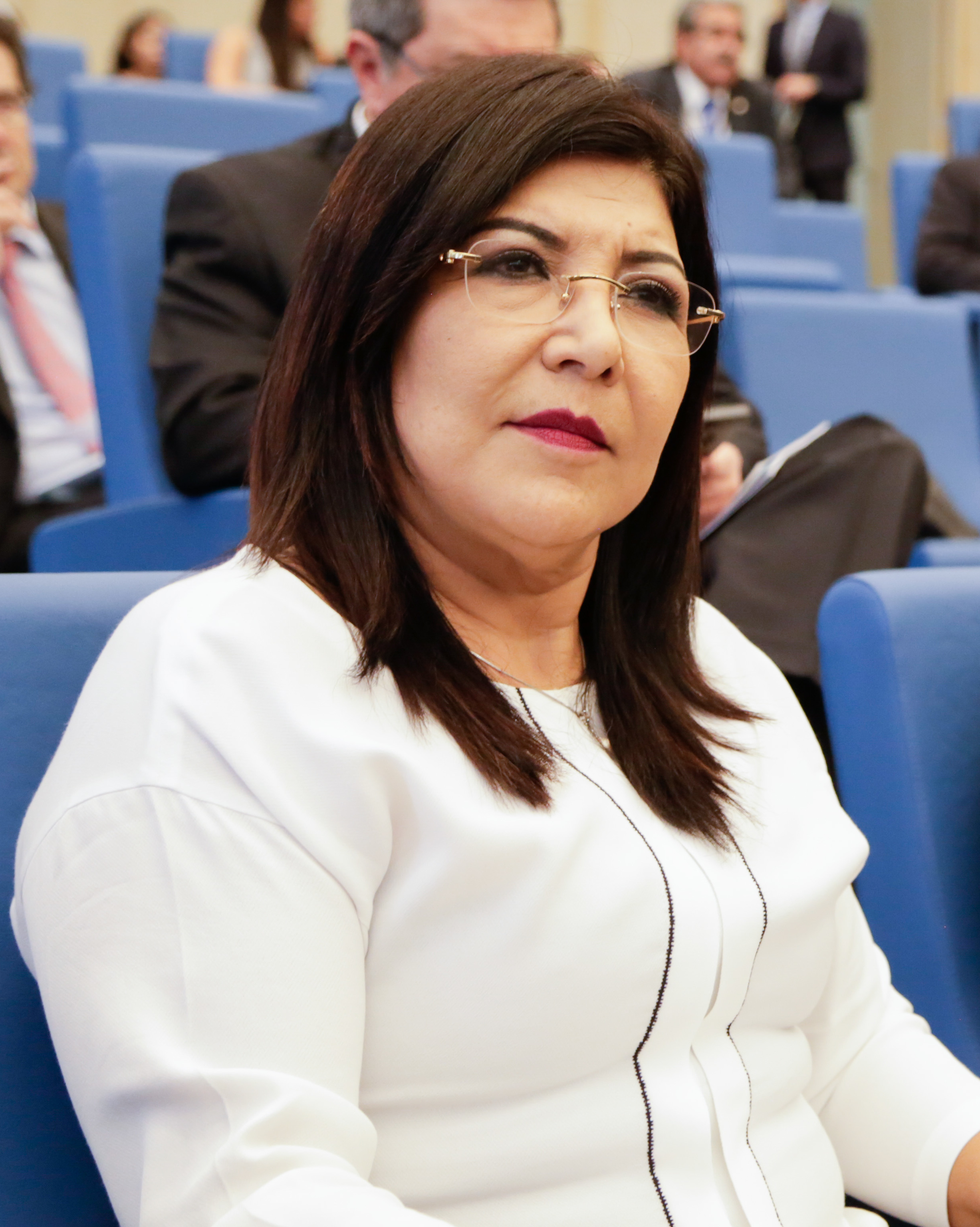 22 de noviembre de 2017 - 34 Asamblea del Parlamento Latinoamericano Tema: Asambleístas participan en la 34 Asamblea del Parlamento Latinoamericano. Fotografía: Karol Cueva/Asamblea Nacional